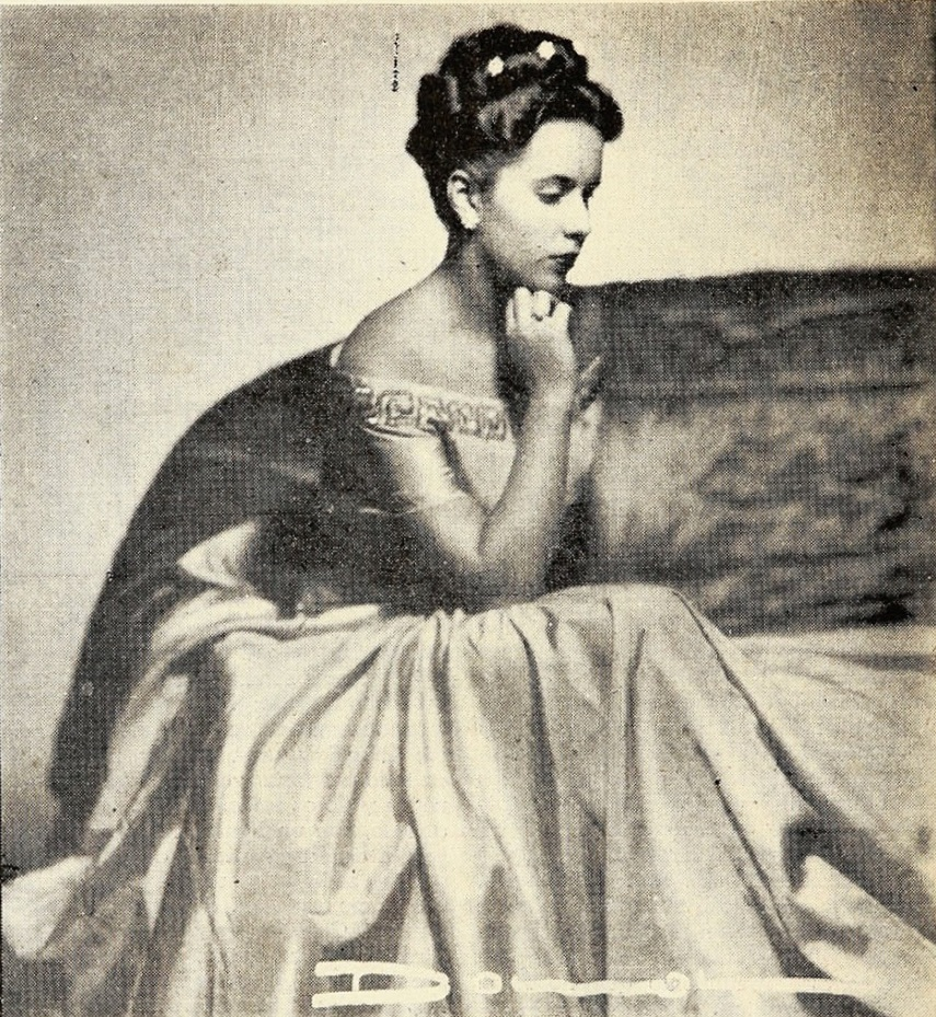 María Delfina Guzmán Correa en 1946.